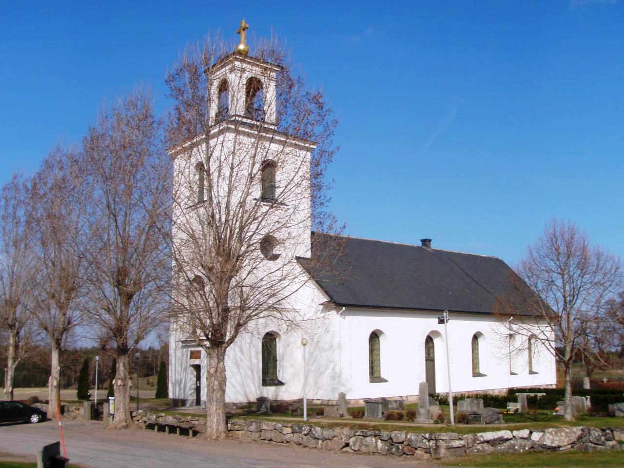 Häradshammars kyrka